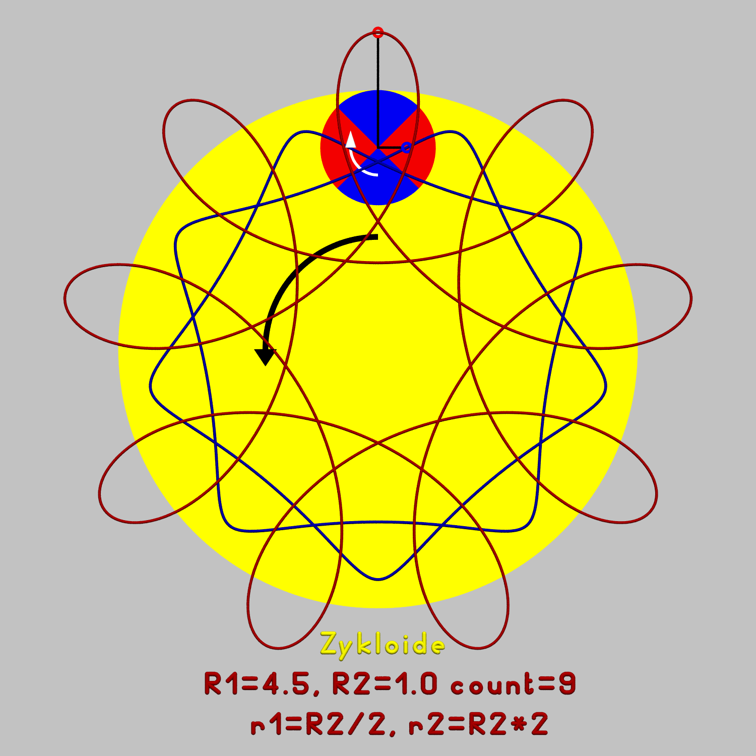 Hypocycloid